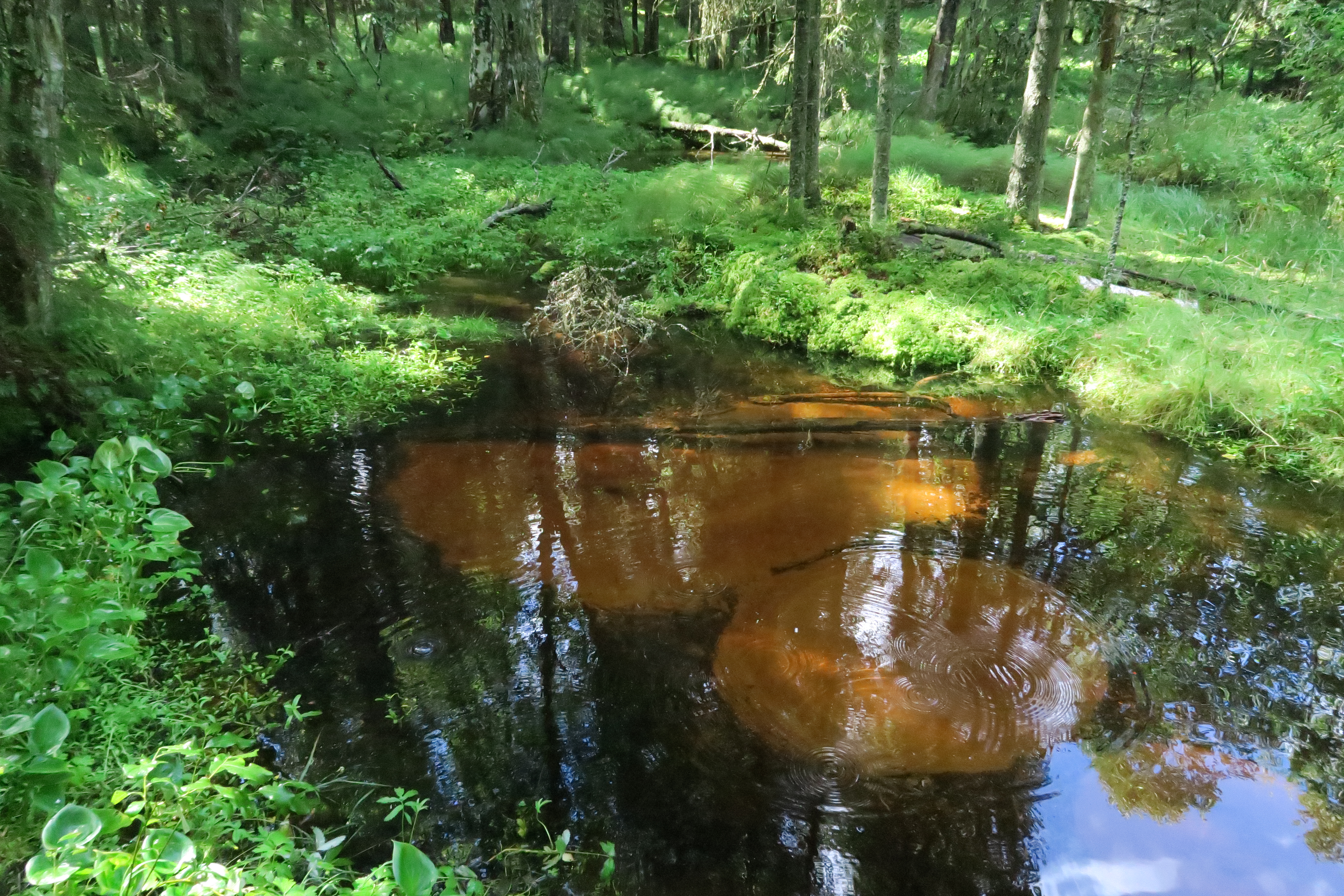 Uhrilähde Jämijärvellä.